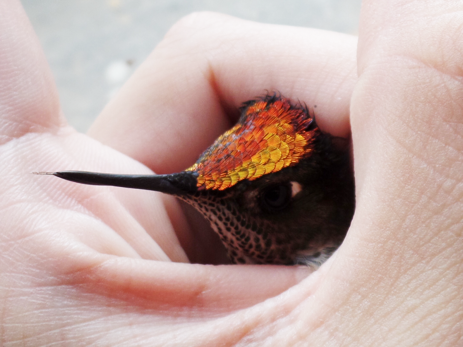 Sephanoides sephaniodes macho en recuperacion, antes de ser liberado en San Martin de los Andes, Neuquen, Argentina